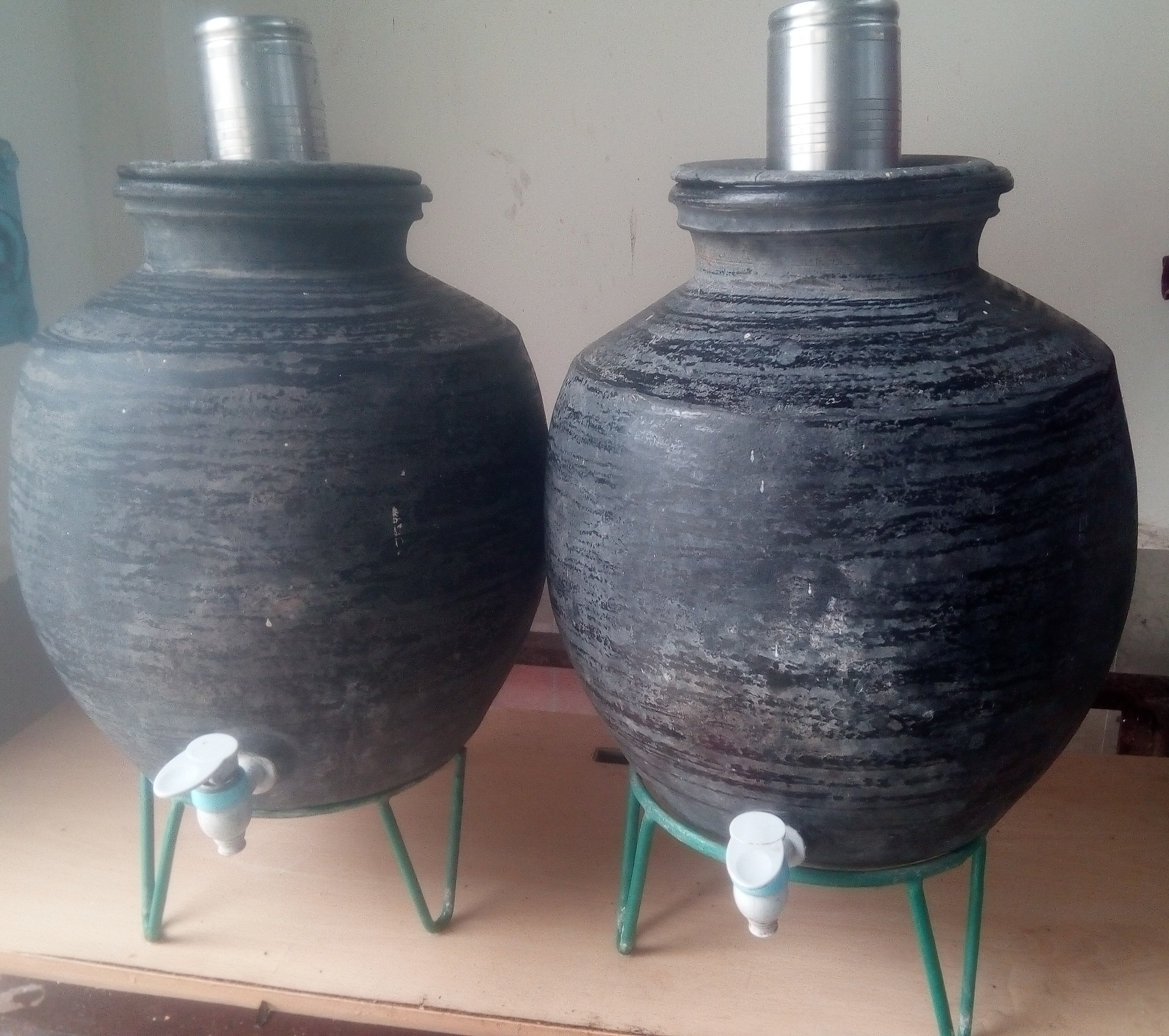 प्लास्टिक नळकांडे माठ